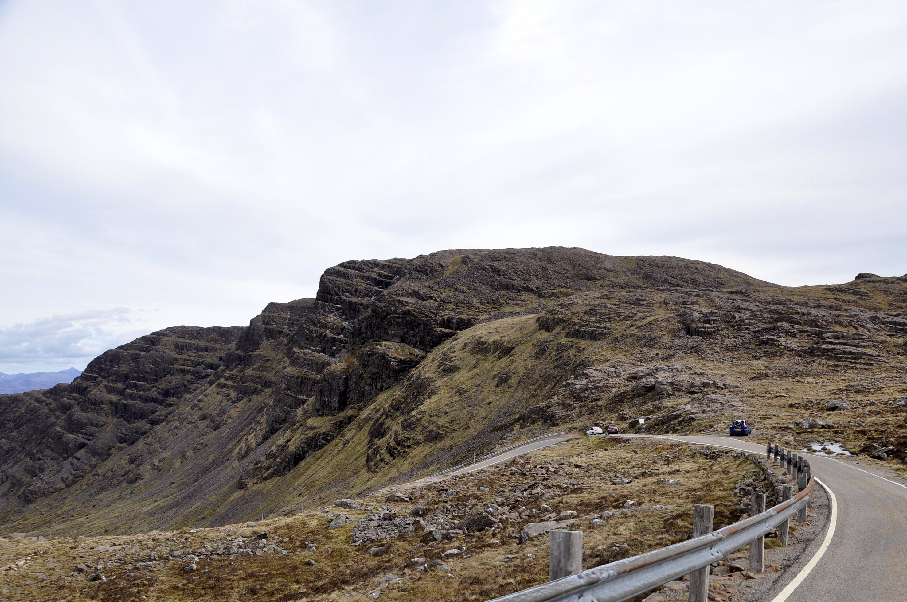 Bealach na Ba - Applecross - Schotland